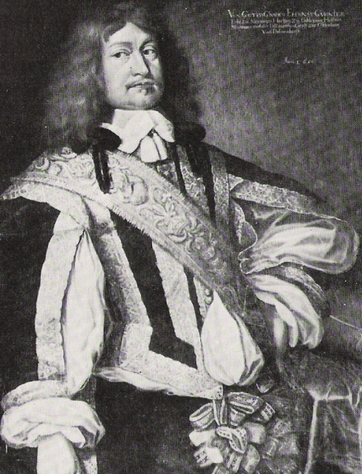 Ernst Günther, 3. Herzog von Schleswig-Holstein-Sonderburg-Augustenburg (* 14. Oktober 1609; † 18. Januar 1689)